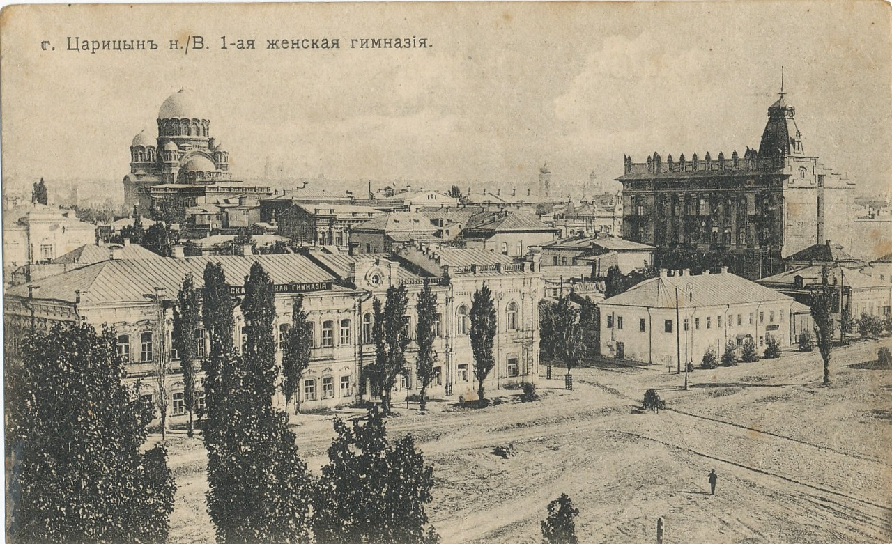 Город Царицын. В левом нижнем углу - Первая женская гимназия, в левом верхнем - Александро-Невский собор